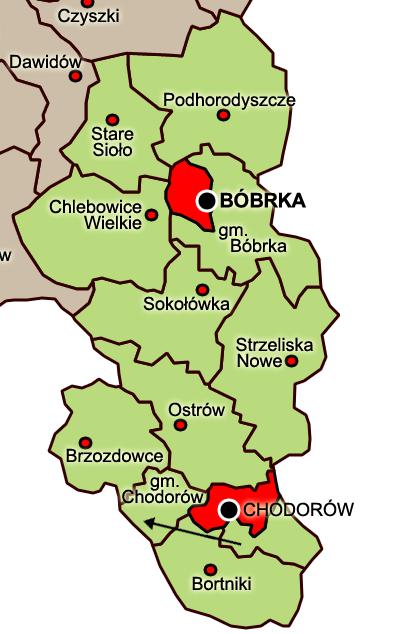 Бібрзький повіт